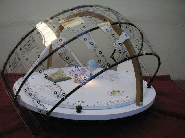 Heliodon é um dispositivo eletro-mecânico, usado como recurso didático para o ensino da Geometria Solar, na arquitetura e em outras áreas, para simular o movimento aparente do Sol.